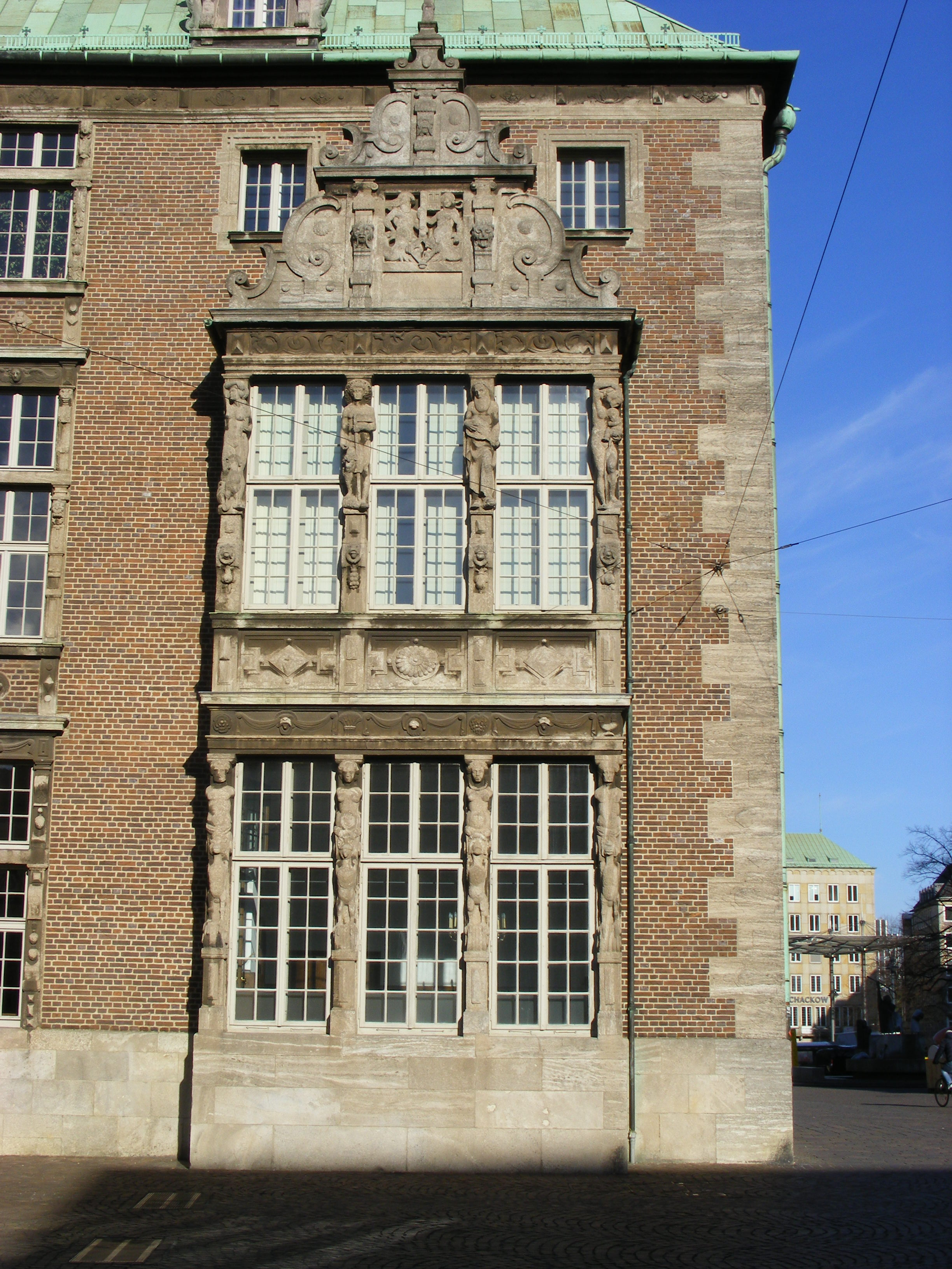 Bürgermeistererker des Neuen Rathauses in Bremen (Erweiterungsbau Rathauses, 1909–1913)